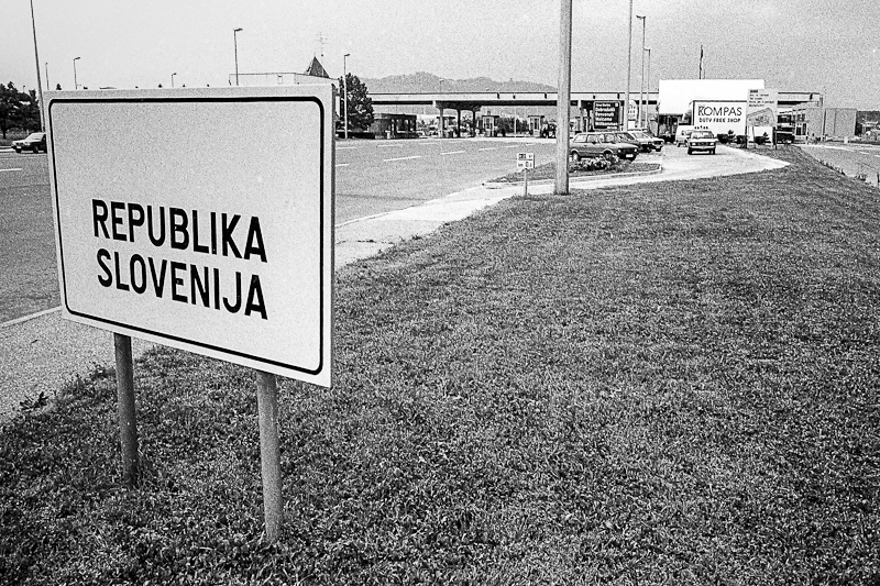 Mejni prehod Vrtojba med slovensko osamosvojitveno vojno, dne 26.06.1991, ob prihodu tankovske kolone JLA.